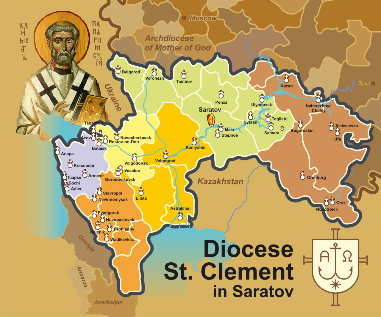 Diocèse catholique de Saratov.